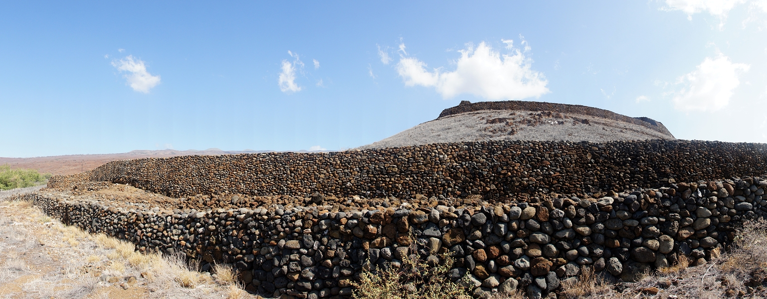 Пуукохола-Хеиау